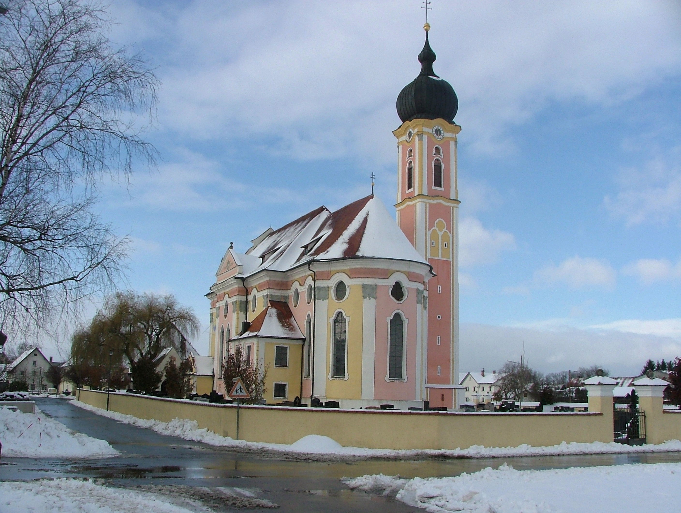 Kirche